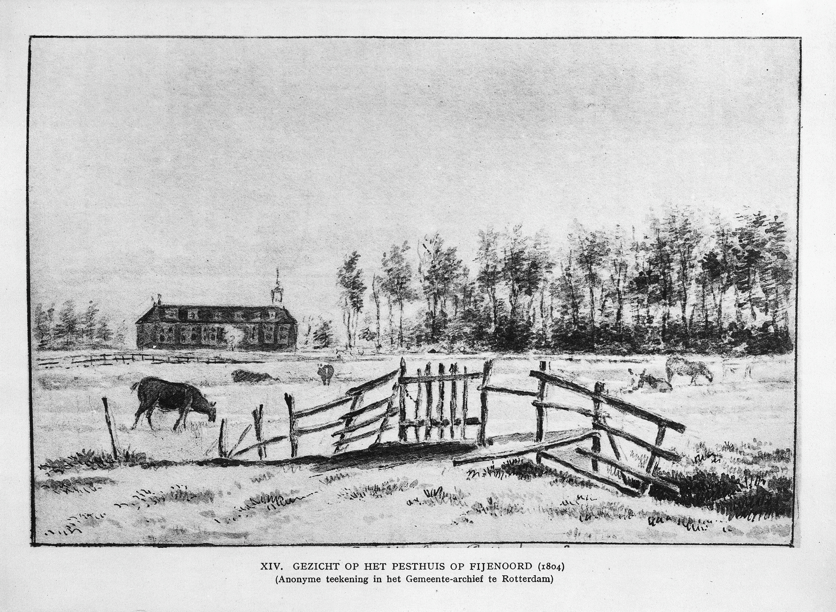 gezicht op het pesthuis op Feijenoord 1804 Gemeente archief